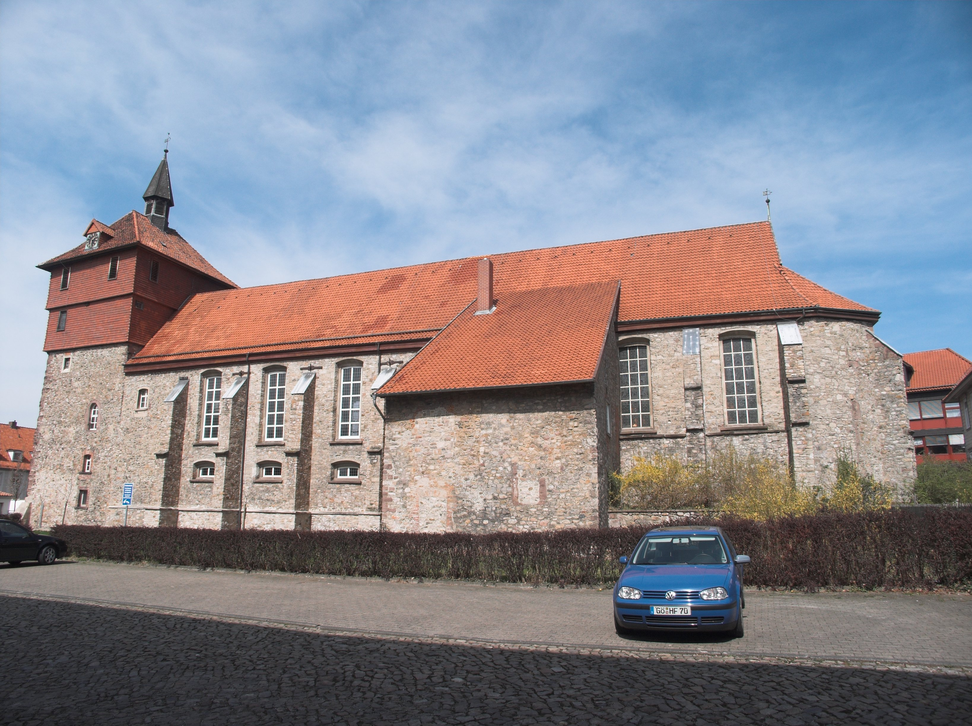 Kirche St. Jacobi in Osterode am Harz vor der Renovierung